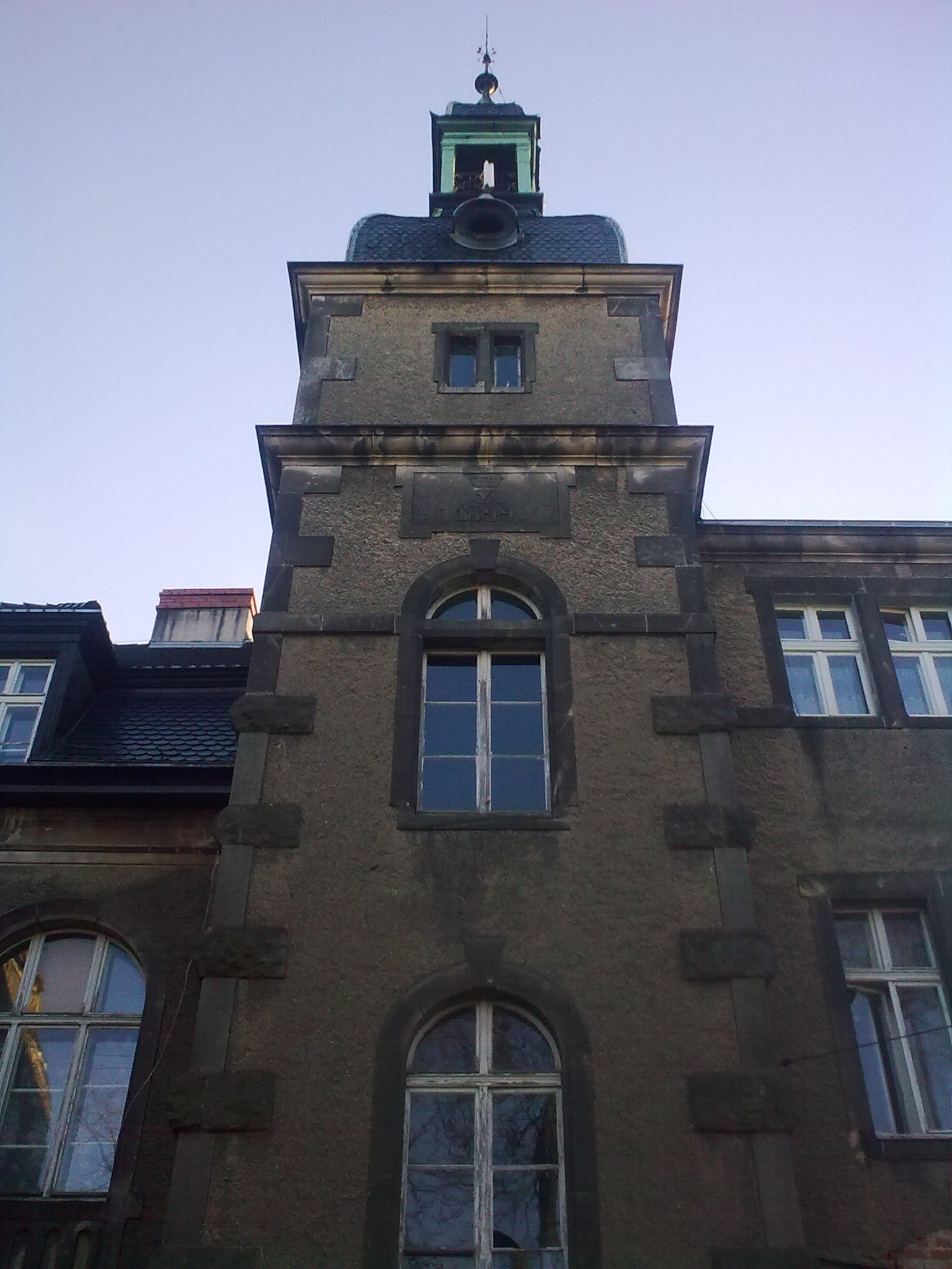 Pałac w Wiśniowej